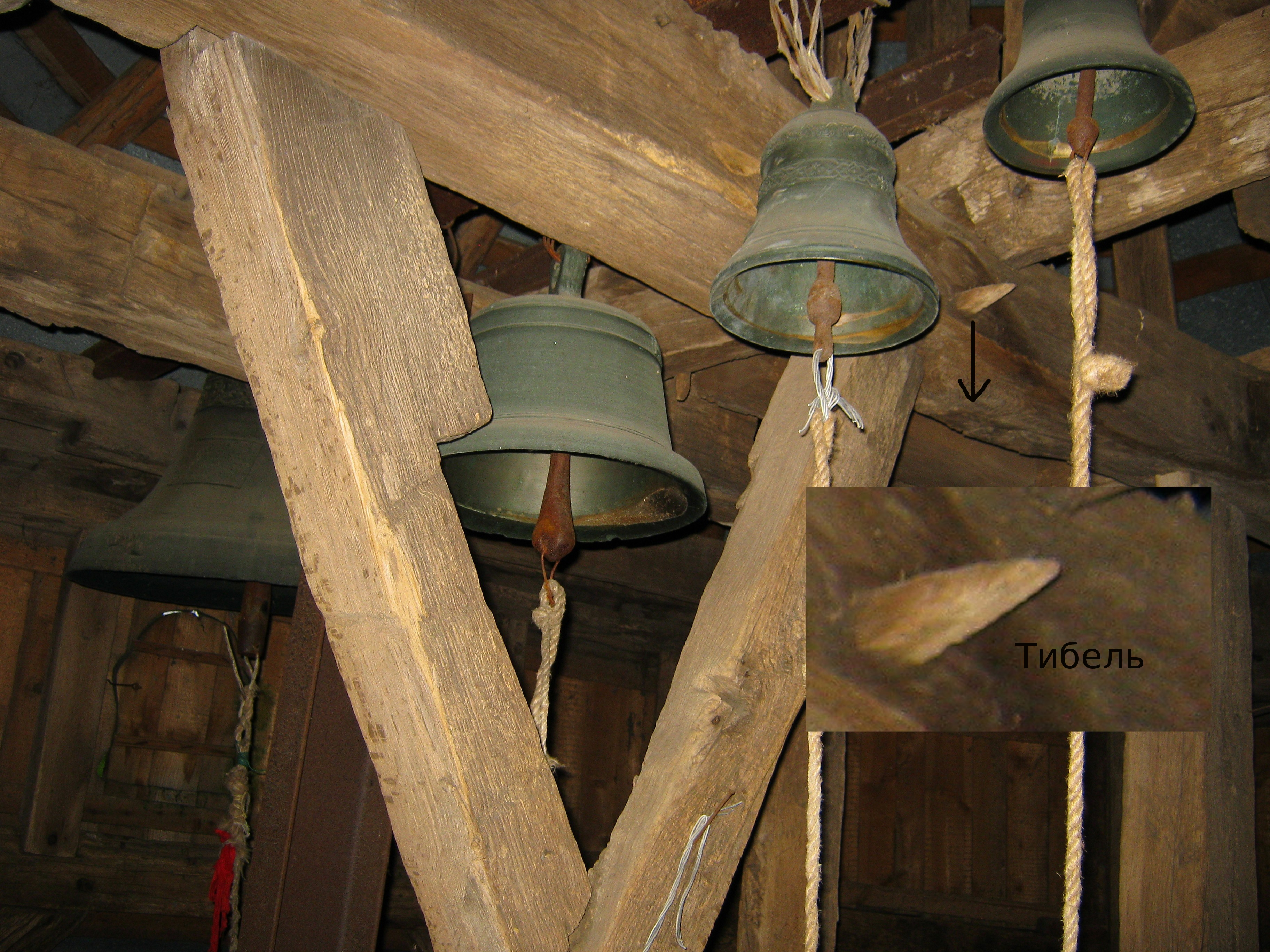 Тибель зі зворотнього боку на дзвіниці Миколаївської церкви (Колодне)